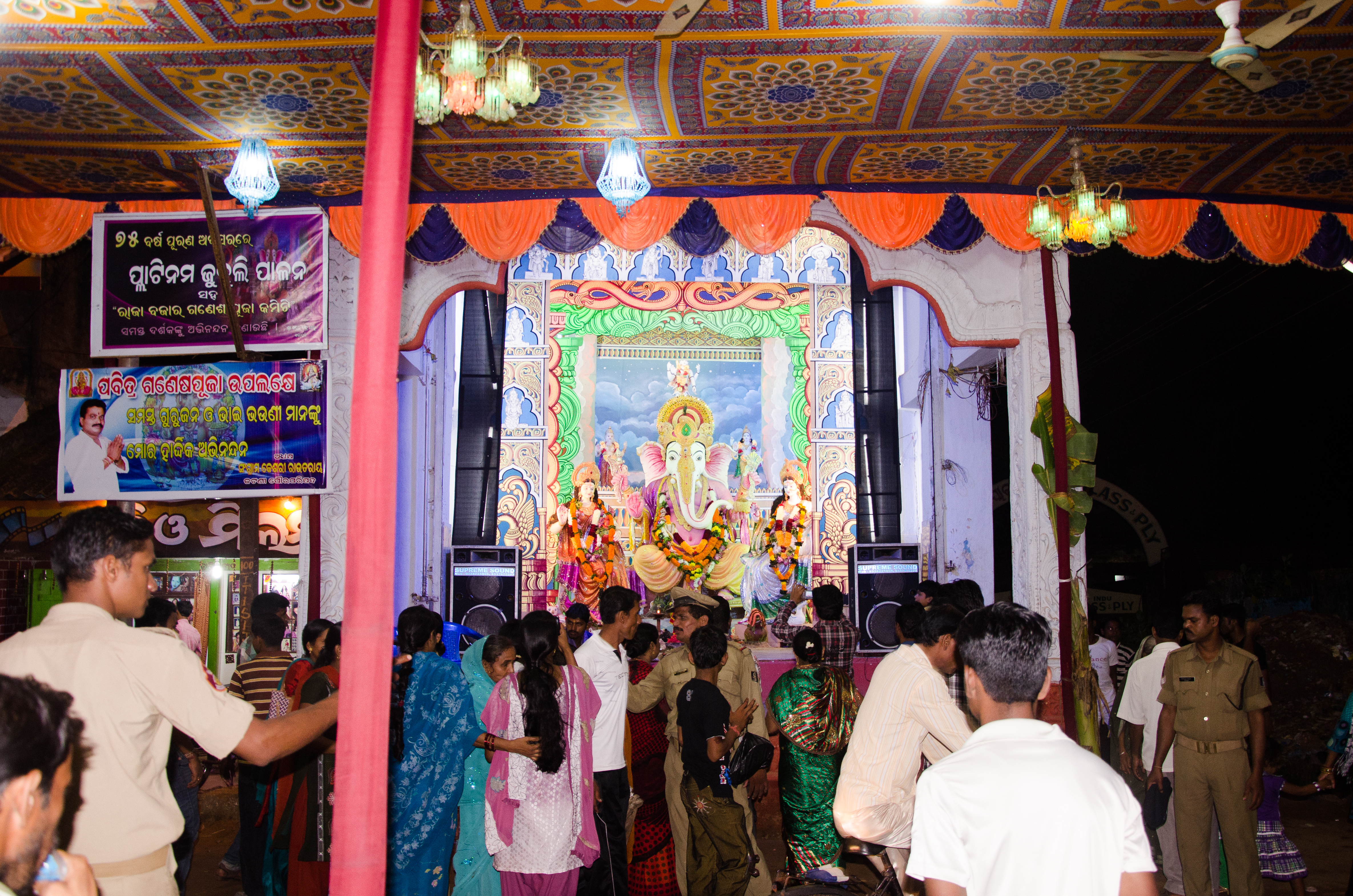 Ganesh Puja in 2012, Jatani, Raja Bazar